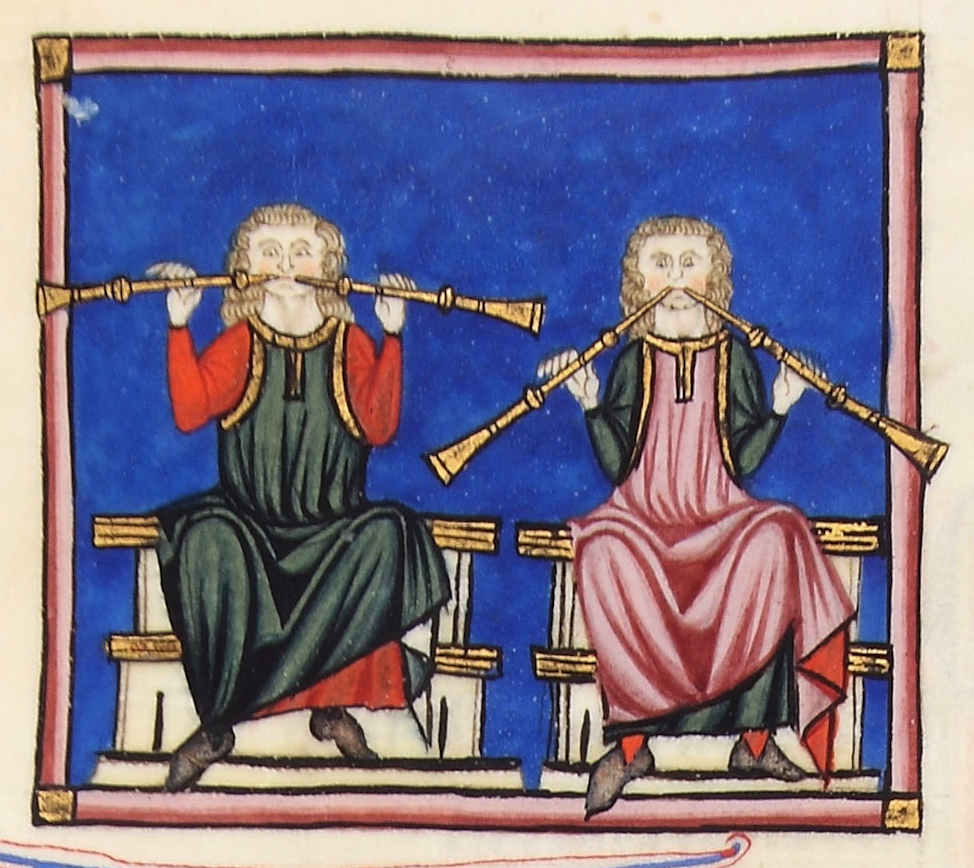 Ilustracón dos manuscritos das catigas de Sta. María. Século XIV